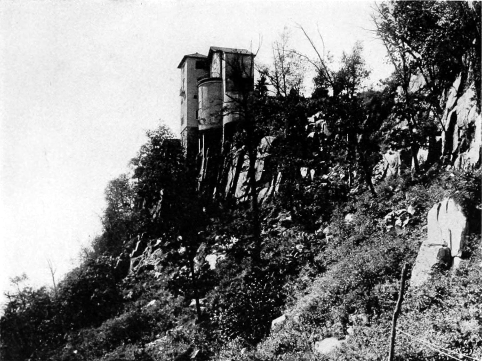 Karl Bitter home in Weehawken, New Jersey